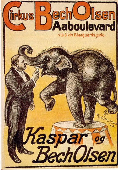 Denne plakat blev brugt af Cirkus Bech Olsen i 1910, hvor hovedattraktionen var babyelefanten Kaspar. Kaspar blev født i Zoologisk Have i København den 9. december 1907. Forældrene var hanelefanten Chang og hunelefanten Ellen, begge asiatiske elefanter. I 1910 og 1911 udlejede Zoologisk Have elefanten til Cirkus Bech Olsen, hvilket gav anledning til heftig pressedebat om dyr i cirkus. (Kilde: Danske Cirkusvenner)